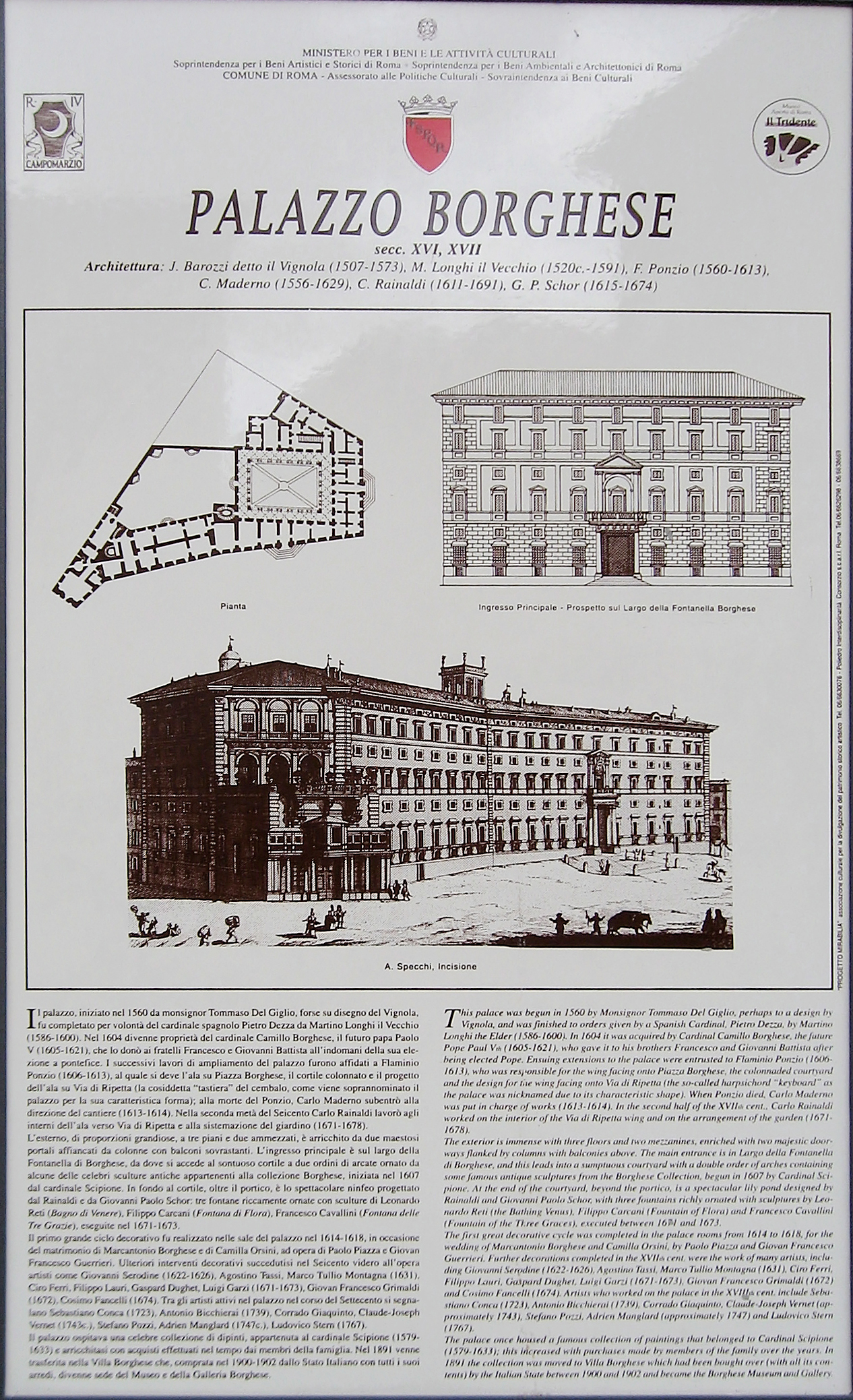 Tafel mit Plan des Palazzo Borghese in Rom/Italien